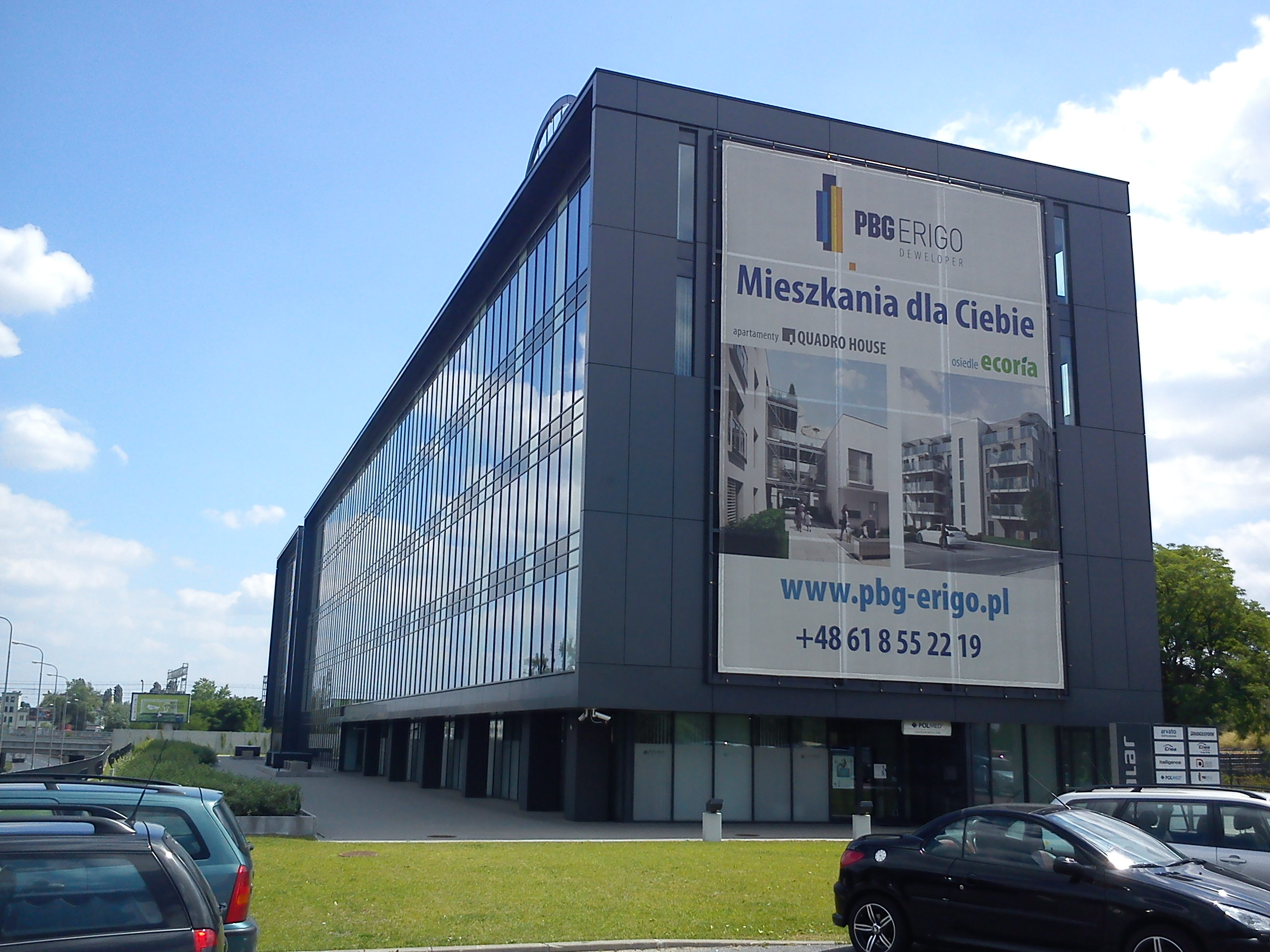 Biurowiec Skalar w Poznaniu, ul. Hetmańska.